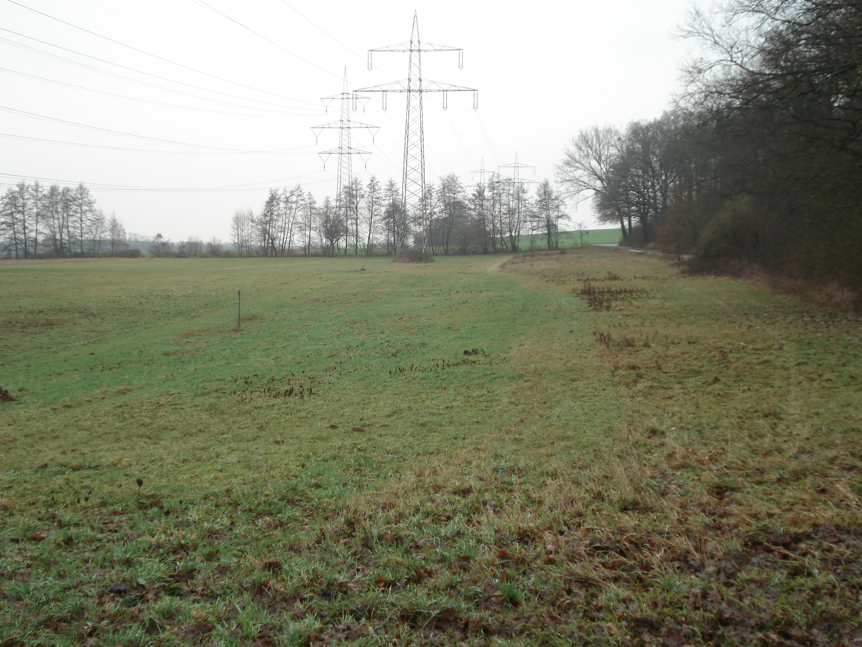 Der vermutliche Standort des verschwundenen Dorfes Bruchhausen